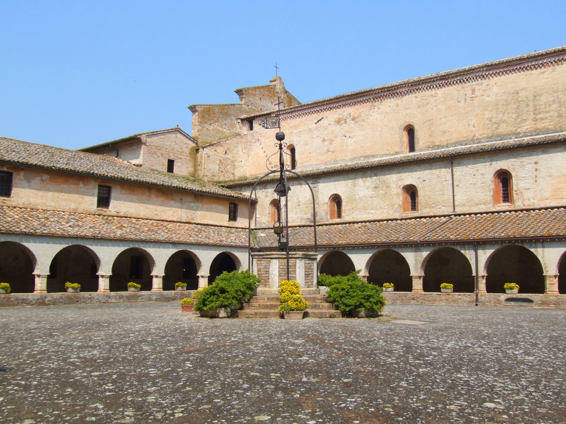 Chiaravalle Abbey, Fiastra Native nameAbbazia di Chiaravalle di FiastraLocationFiastra, Marche, ItalyCoordinates43° 13′ 18″ N, 13° 24′ 19″ E Established1142Web page control : Q1775124 VIAF: 241191208 institution QS:P195,Q1775124